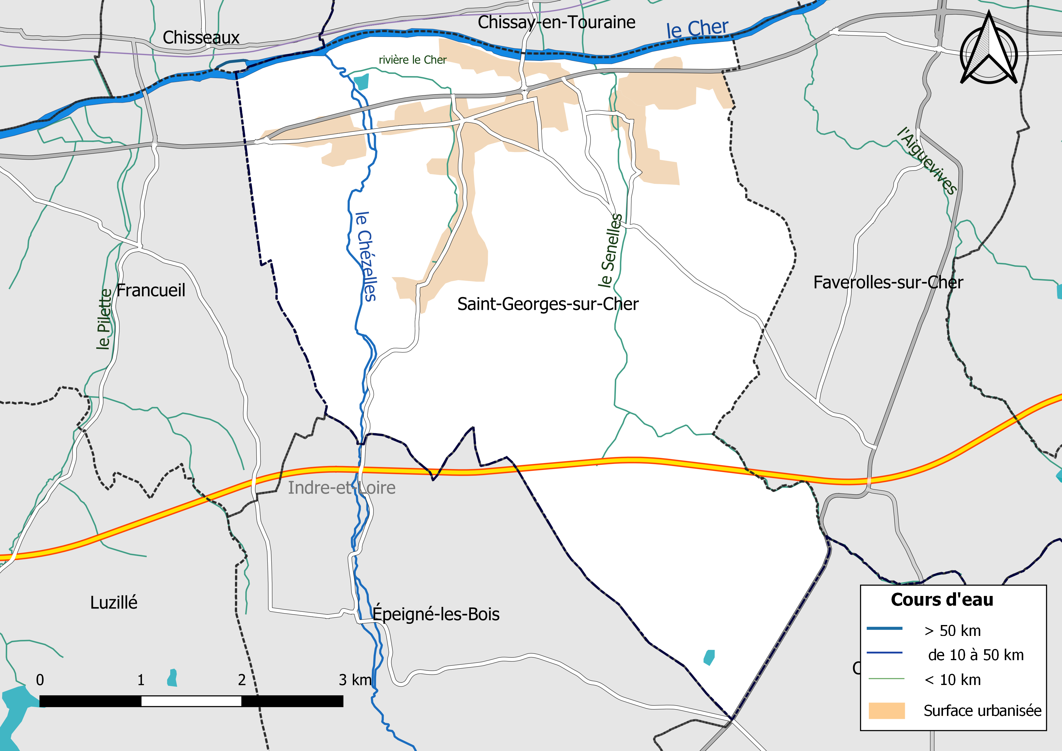 Carte du réseau hydrographique de la commune de Saint-Georges-sur-Cher (Loir-et-Cher, France).